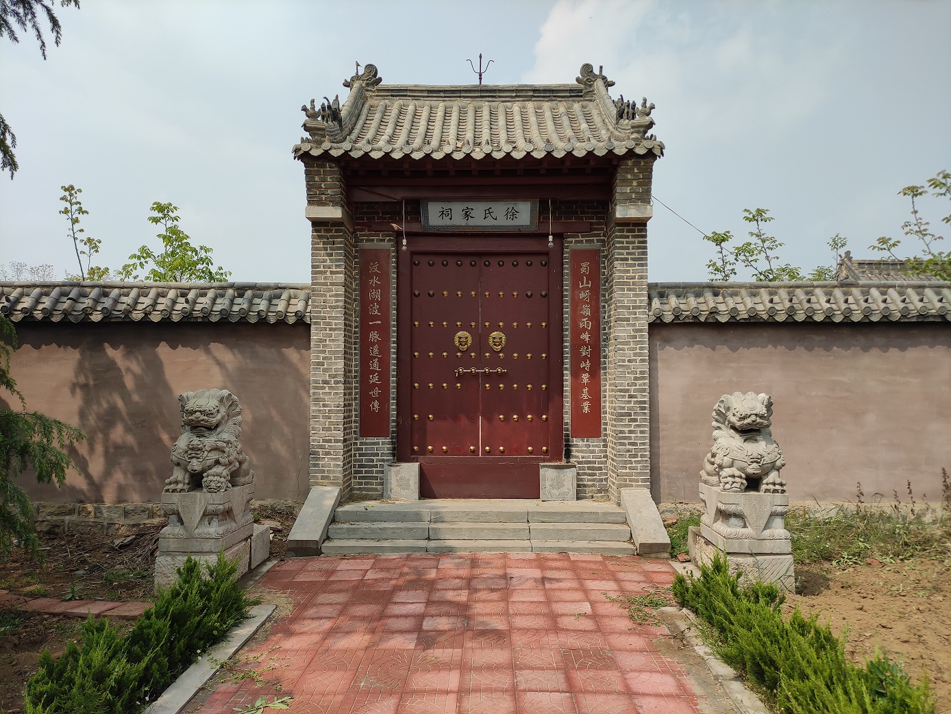 徐氏家祠，摄于山东省东平县接山镇鄣城村